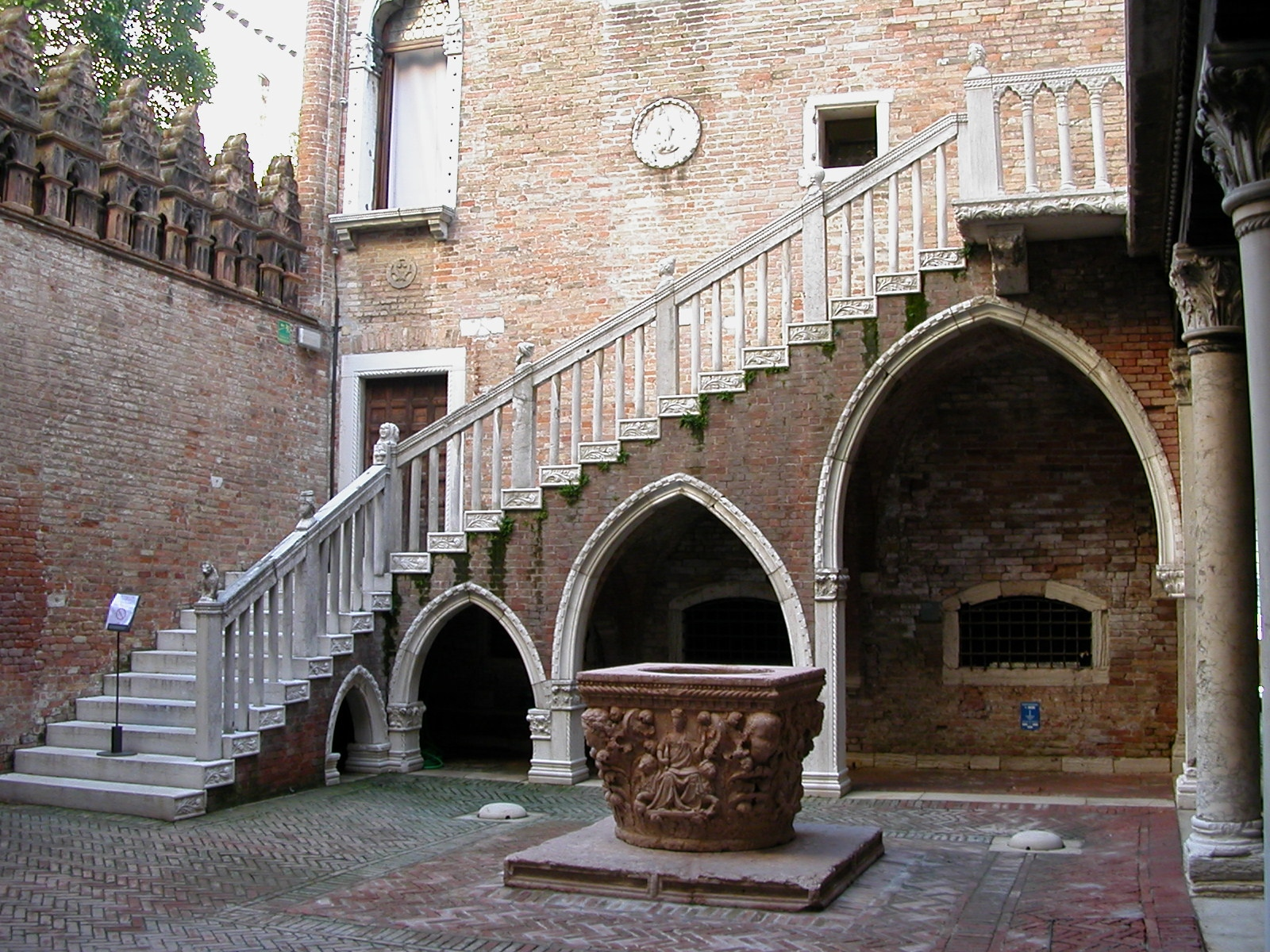 Venezia - Ca' d'Oro. Il cortile.